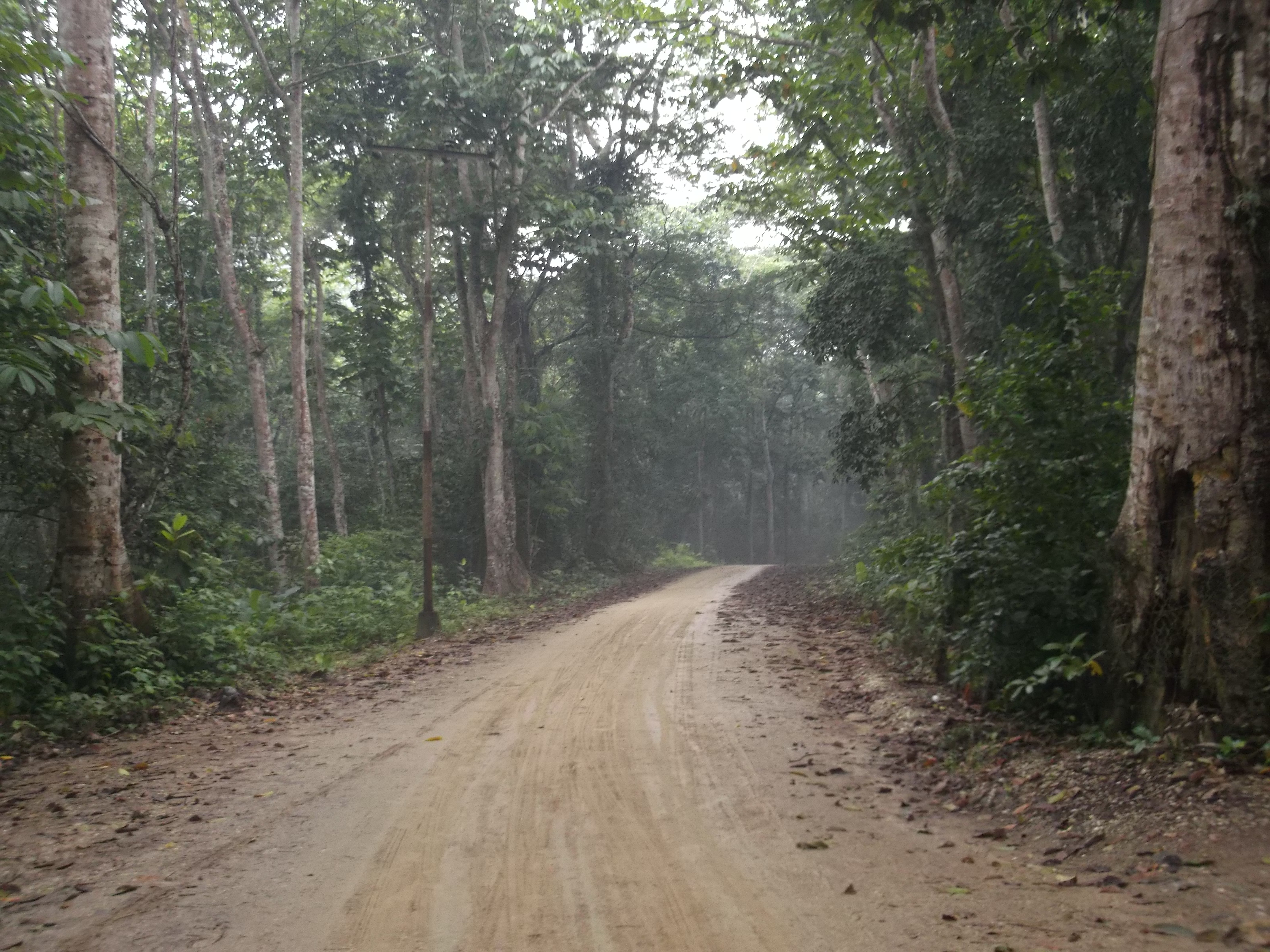 Camino en el Parque Nacional San Esteban